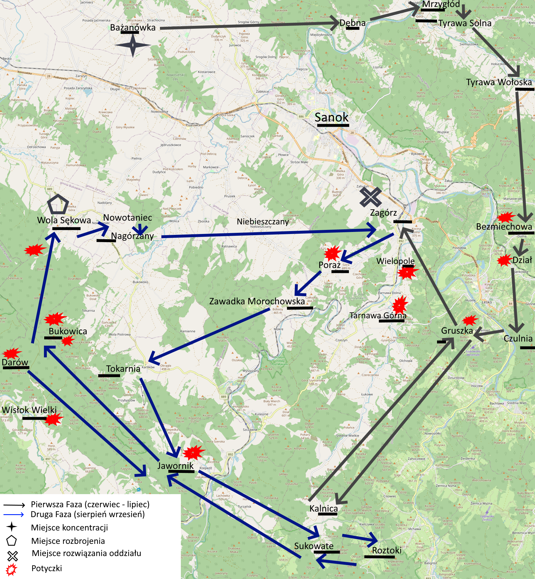 Mapka przedstawia rejon działania Oddziału Partyzanckiego OP-23 (zwanego także Zgrupowanie Południe lub KN-23)